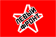 Флаг Левого фронта